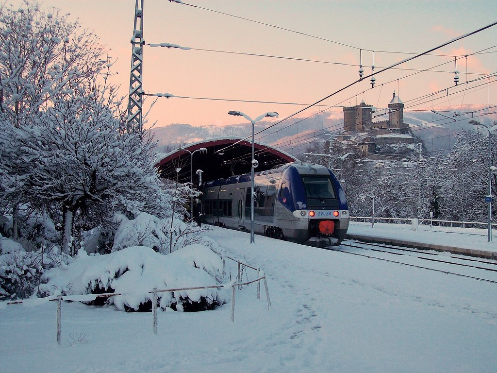 Foix (Ariège, France) : Train entrant en gare sous la neige.